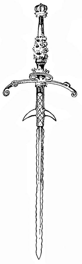 Flammar Zweihander, length 127 cm, circa 1570